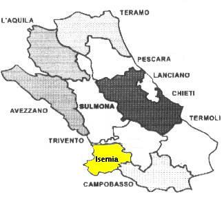 Isernia